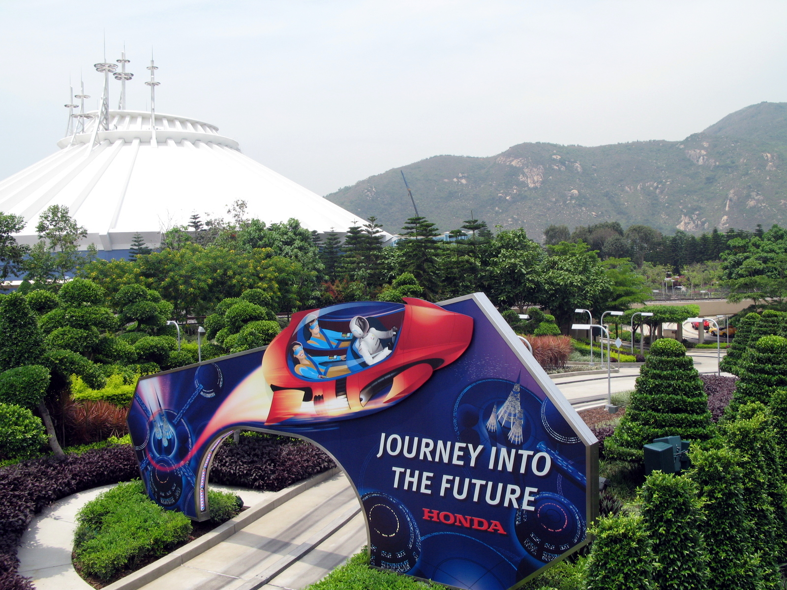 HKDL Autopia